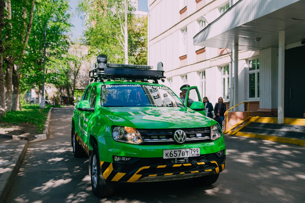 Дорожный патруль ЦОДД. "Первые уроки, посвященные правилам дорожного движения, прошли для учеников младших классов в московской школе № 444 в районе Измайлово..." и начались с перегораживания главного выхода припаркованной машиной. Но на фото не 444-я (она темно-красная), а какая-то другая.